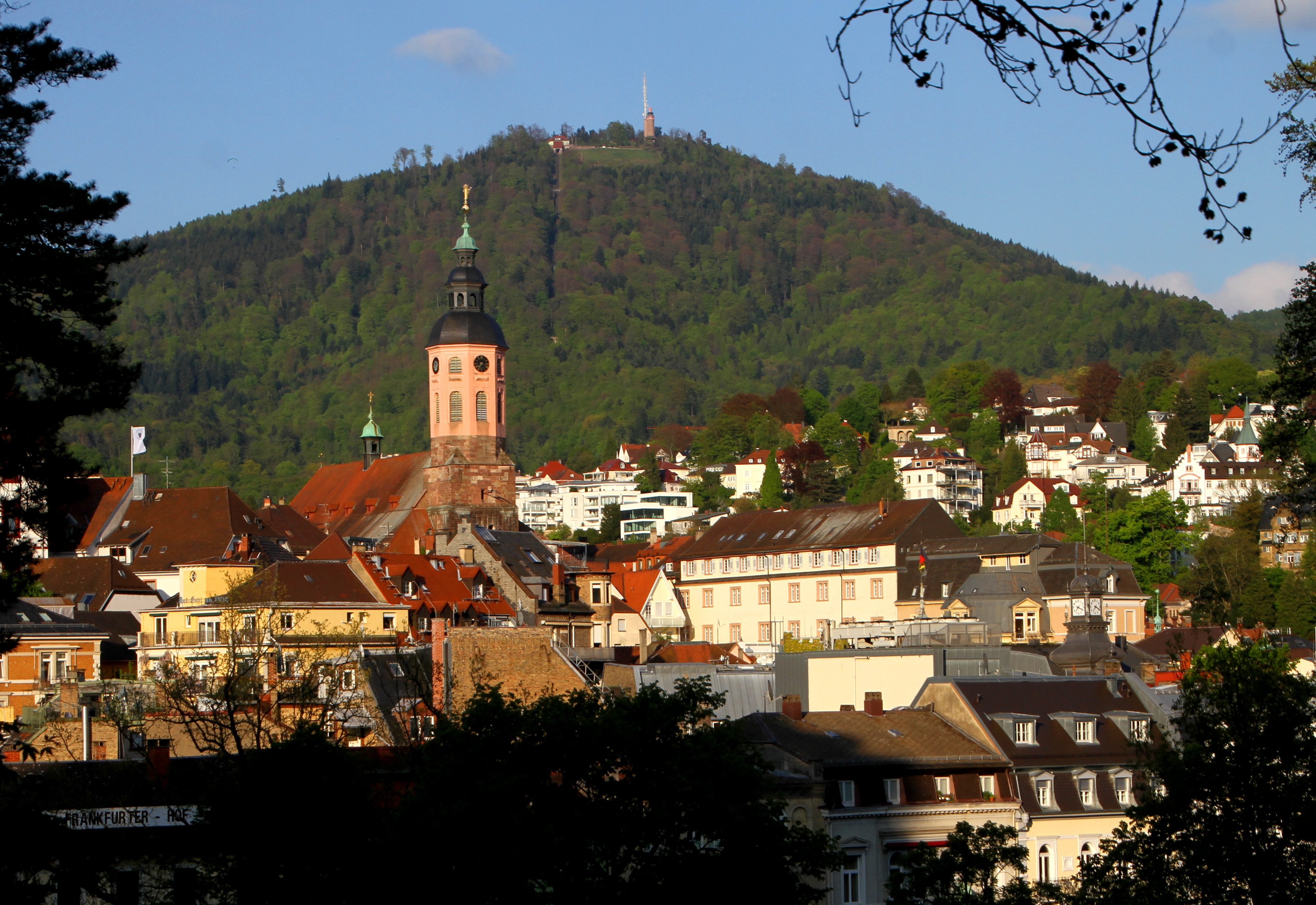 Ansicht von Baden-Baden.